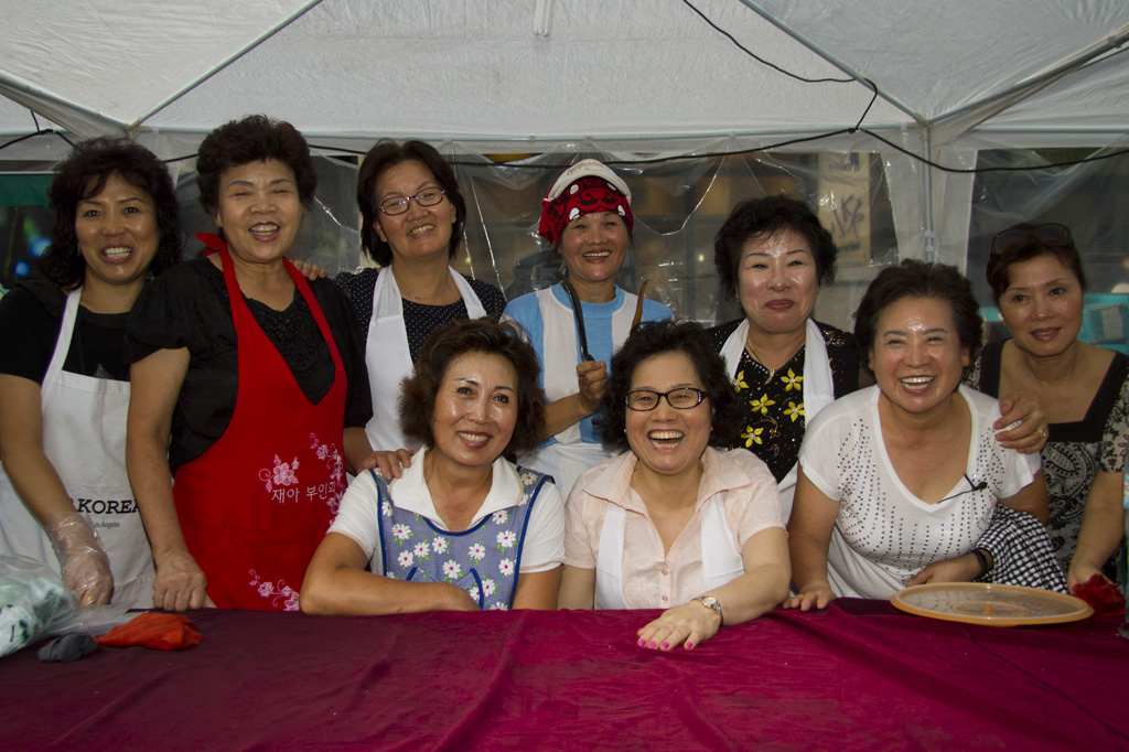 Todas estas mujeres cocinaron en el stand de Corea. ( Foto: Estrella Herrera)